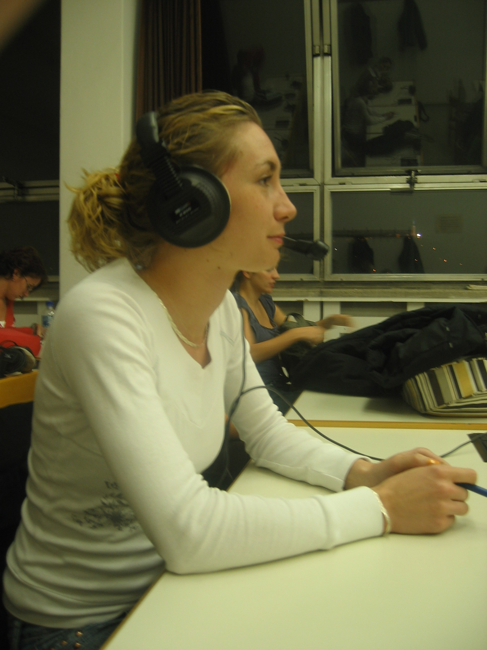 Tolmács a BME-n, 805. tolmácsterem